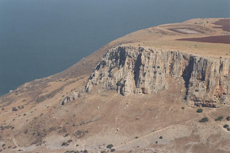 מצוק ארבל Mount Arbel